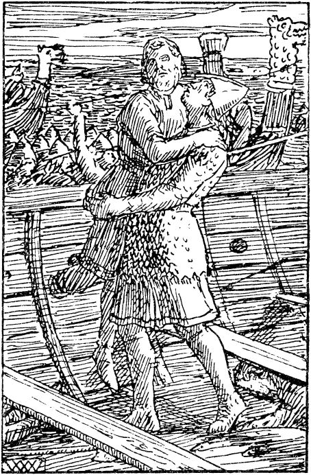 Wilhelm Wetlesen: Illustration for Haraldsønnenes saga (Inges saga), Heimskringla 1899-edition. nn: «Reidar Grjotgardsson tek kong Magnus i fanget sitt.»